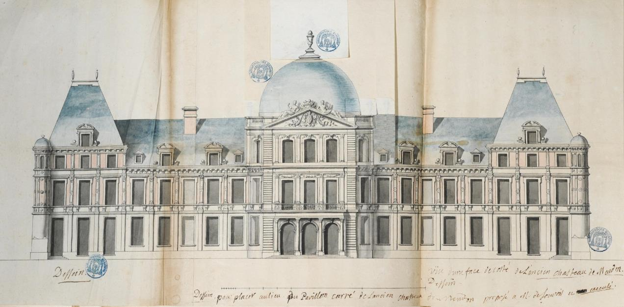 Projet non réalisé de dôme pour le pavillon central du château-vieux de Meudon, par Jules Hardouin-Mansart pour Louvois, vers 1685-1691. Bibliothèque Mazarine, ms 3361.